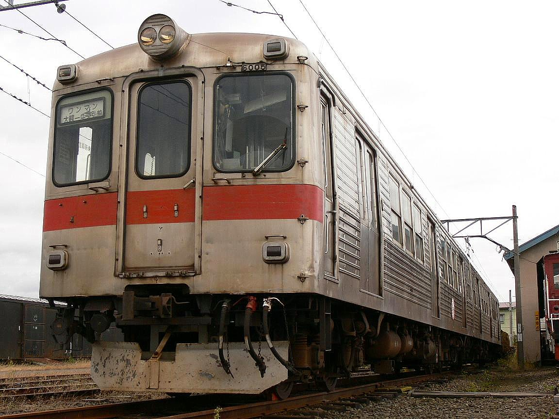 kounan Railway Type 6000(Japan). 元東急6000系電車の弘南鉄道6000系(6005+6006の2両編成) 弘南鉄道大鰐線津軽大沢駅の駅構内にて 許可を得て撮影